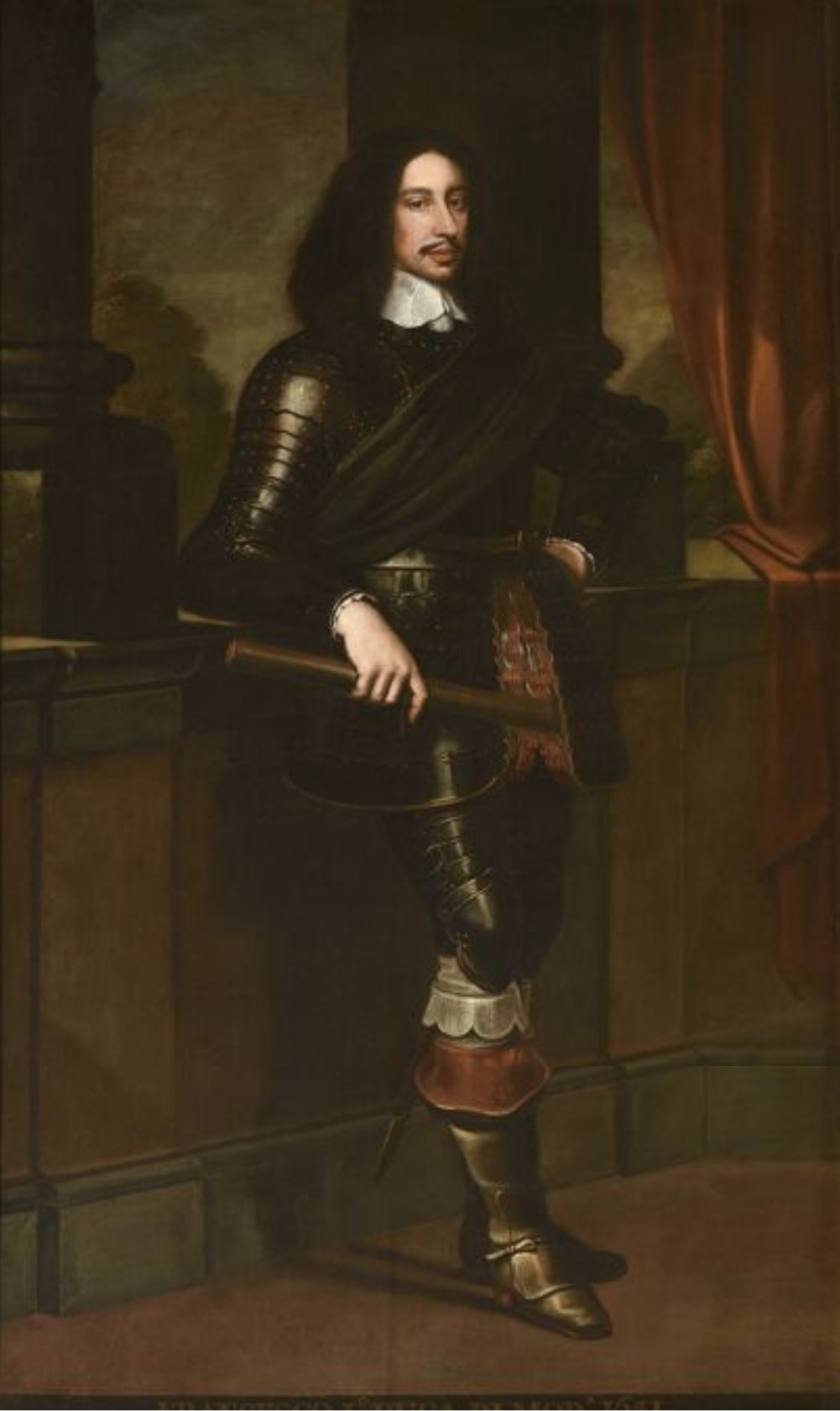 Portrait of Francesco I d'Este (1610-1658)